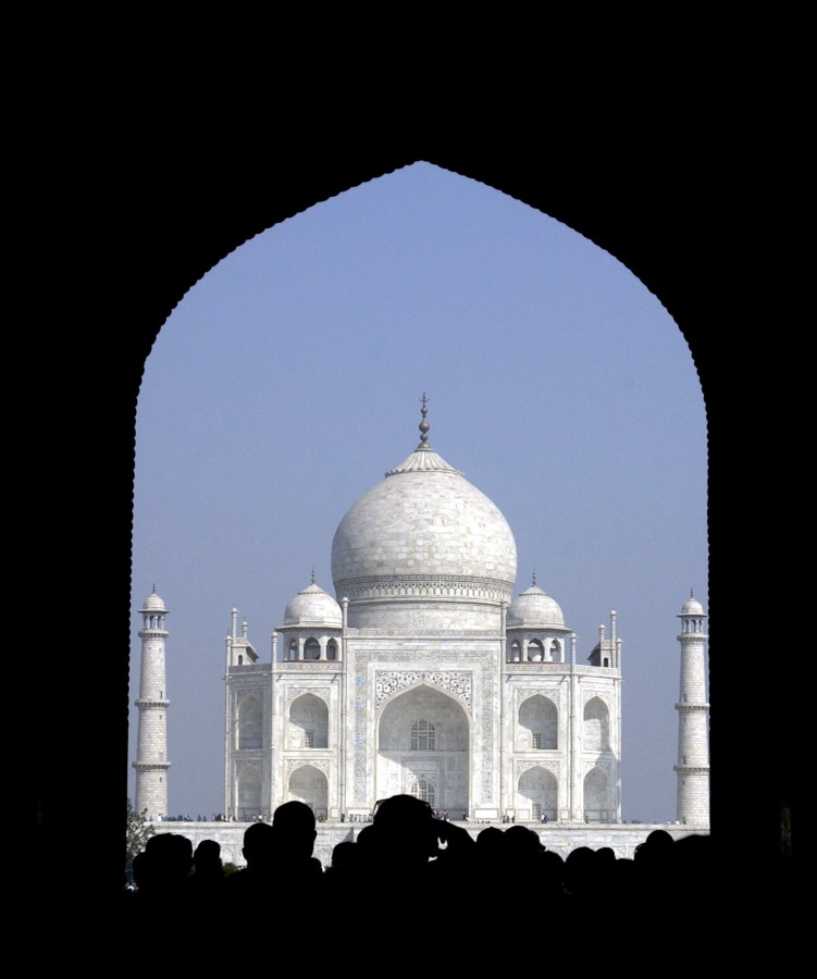 Tadsch Mahal